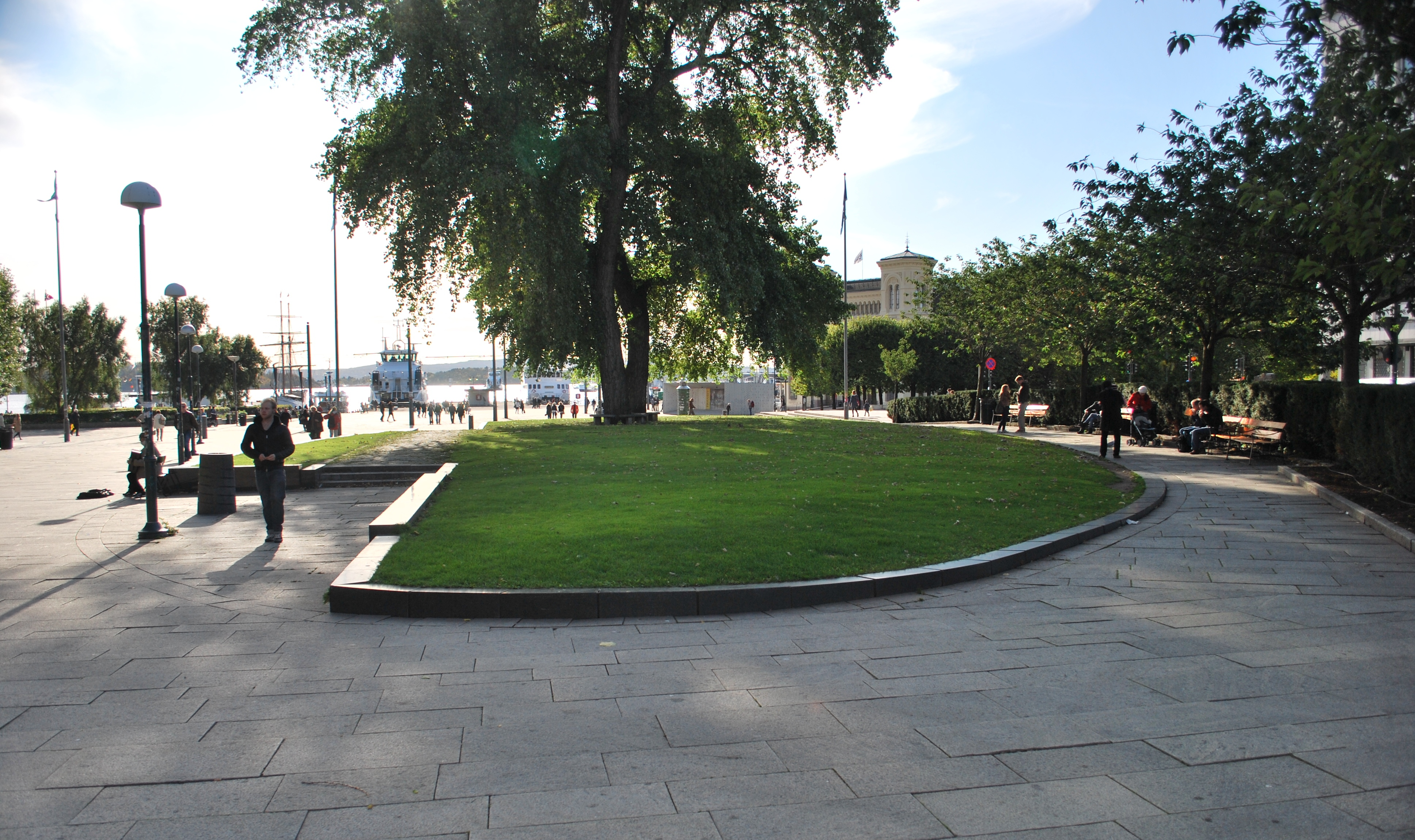 Olav Vs plass, Oslo, sett mot Rådhusplassen